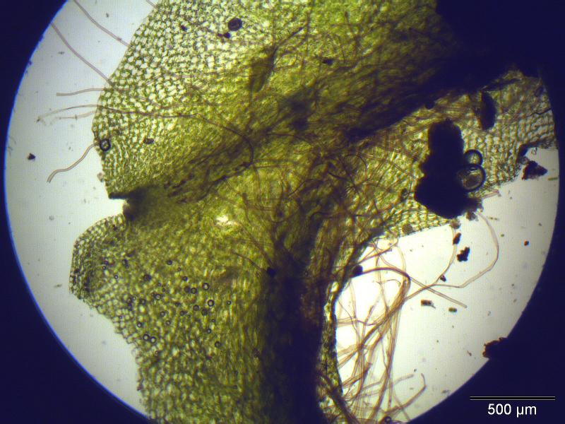 Kelch-Beckenmoos (Pellia endiviifolia), Thallus, Vergrößerung: 40x